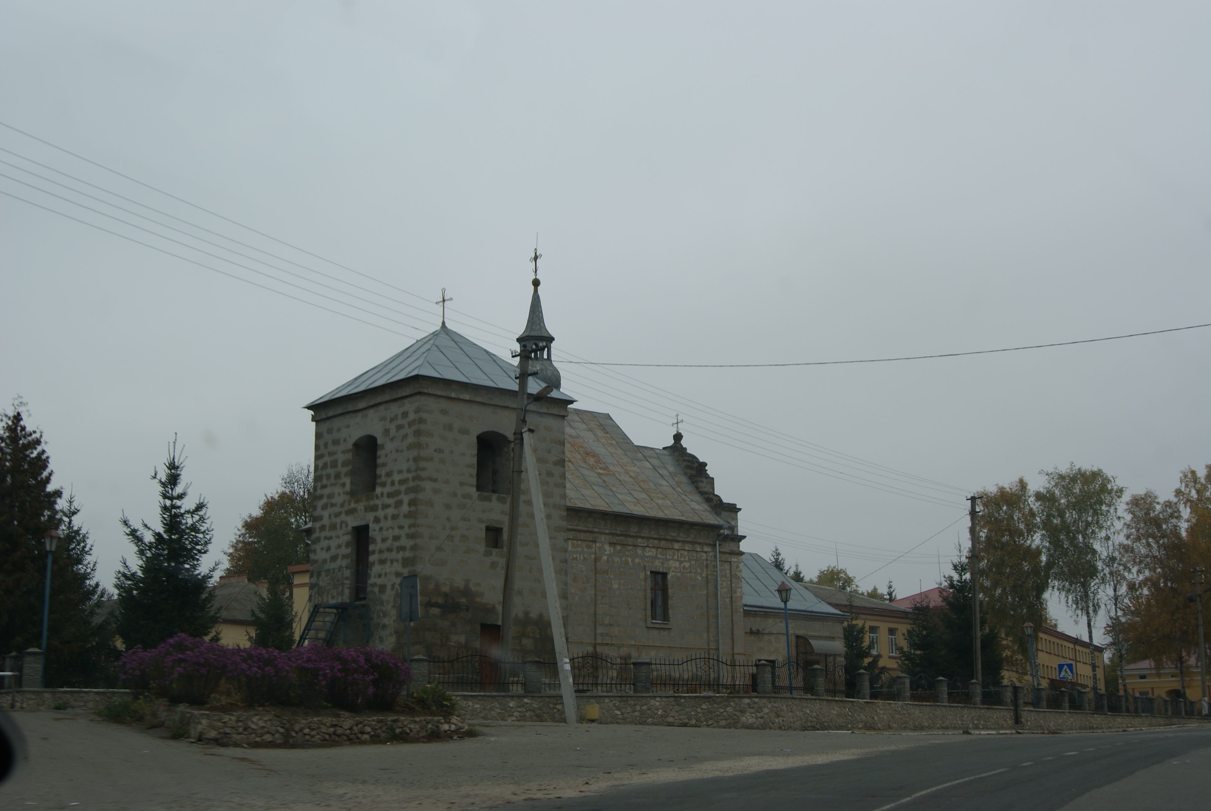 Храм в с.Нове село (Тернопільська область)